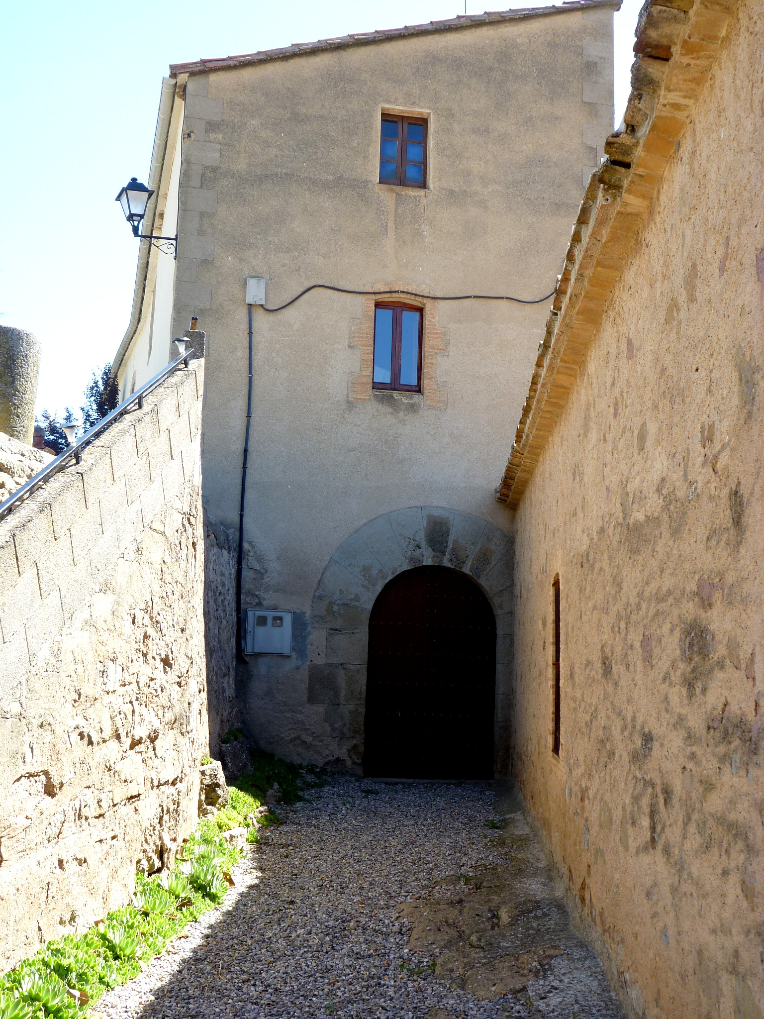 Cal Sala de Vallmanya (Pinós): portal